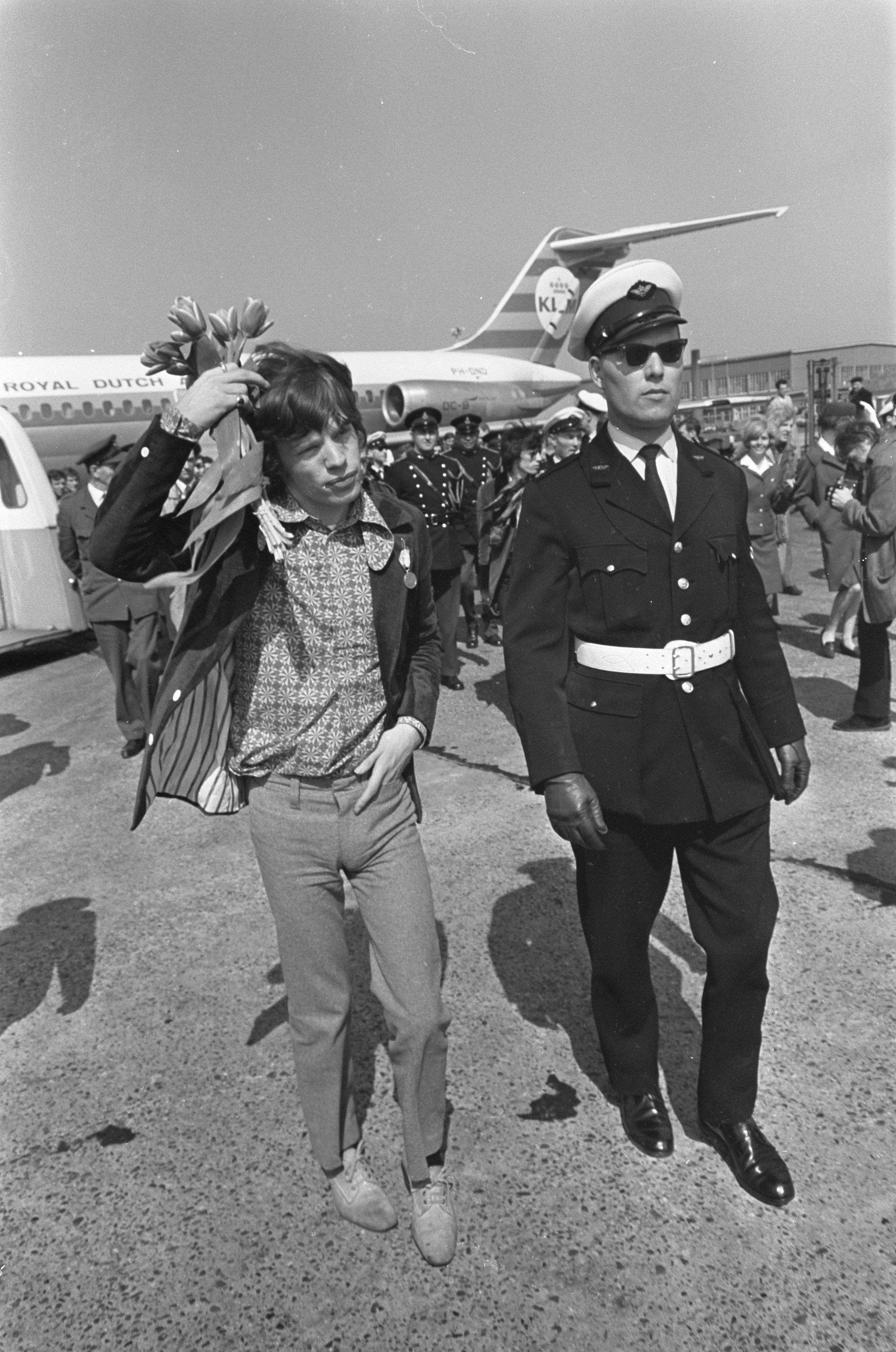 Collectie / Archief : Fotocollectie Anefo Reportage / Serie : [ onbekend ] Beschrijving : Aankomst Rolling Stones op Schiphol, Mick Jagger met bloemen Datum : 15 april 1967 Locatie : Noord-Holland, Schiphol Trefwoorden : BLOEMEN, aankomsten, beatgroepen Persoonsnaam : Jagger, Mick Instellingsnaam : Rolling Stones Fotograaf : Nijs, Jac. de / Anefo Auteursrechthebbende : Nationaal Archief Materiaalsoort : Negatief (zwart/wit) Nummer archiefinventaris : bekijk toegang 2.24.01.05 Bestanddeelnummer : 920-2342